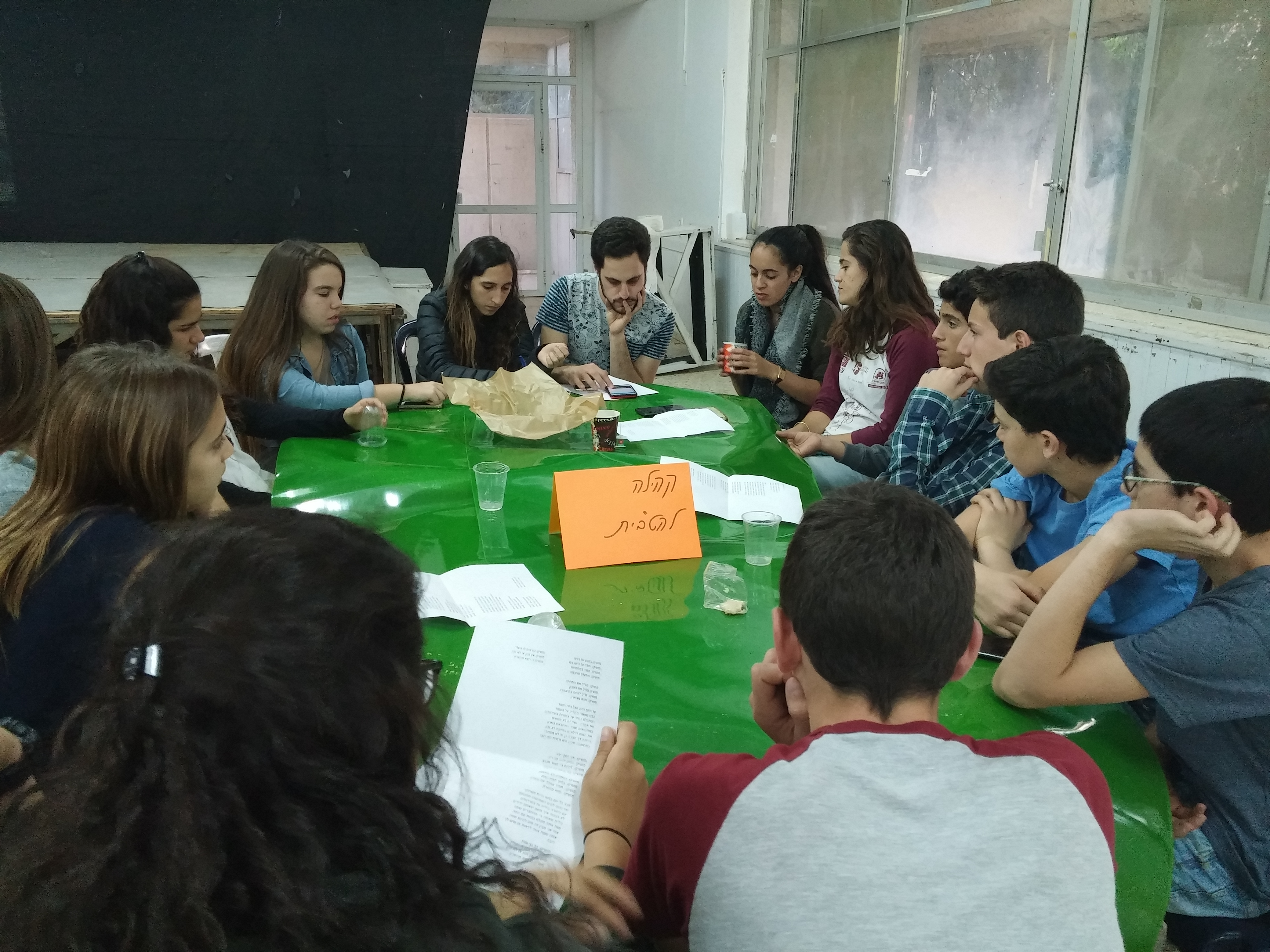 פעילות קפה דילמה שארגנה ועדת תקשורת